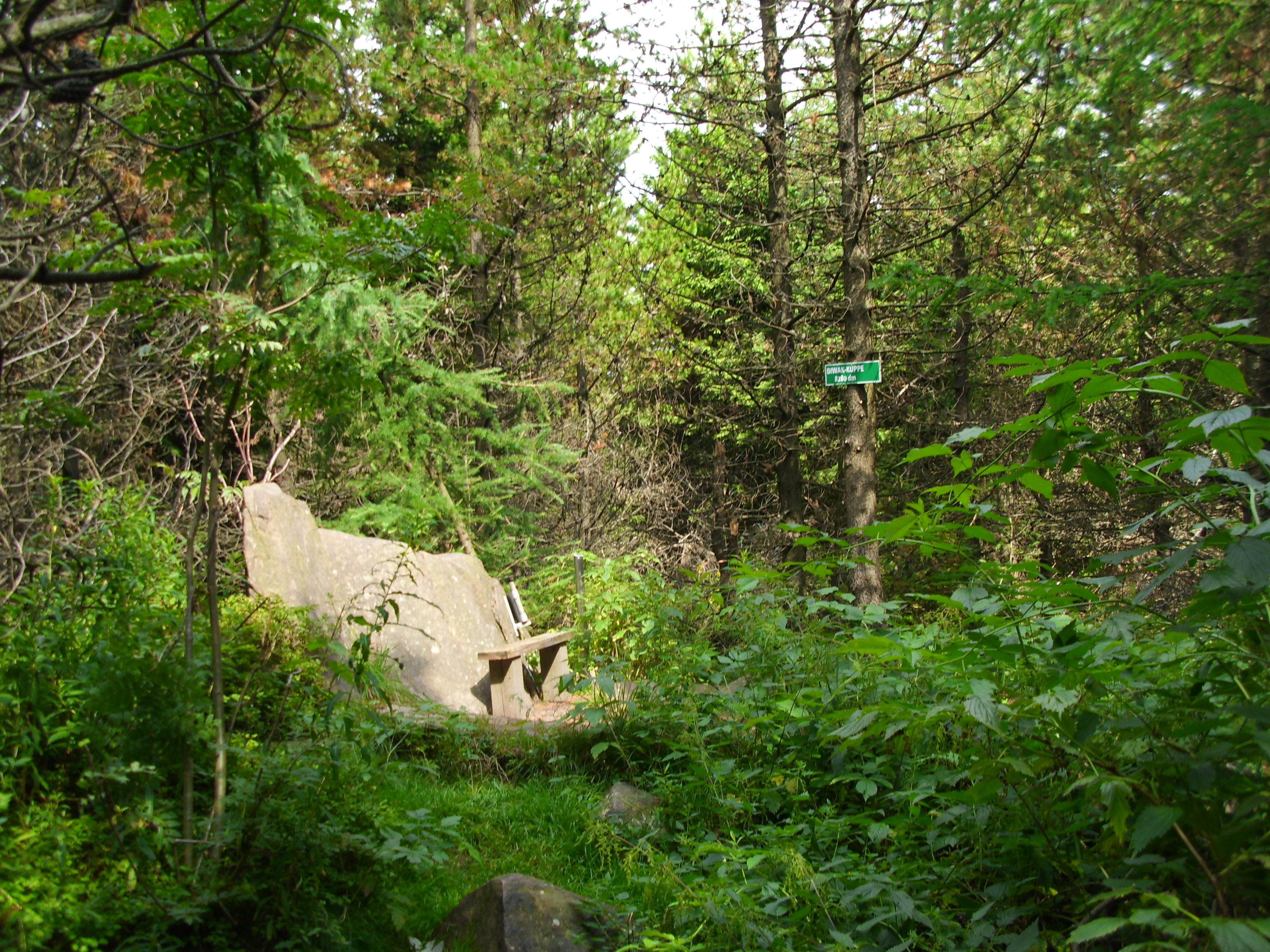 Die Kleine Kuppe liegt auf eine Höhe von 828 m üNN in der Nähe von Zinnwald-Georgenfeld in Sachsen.